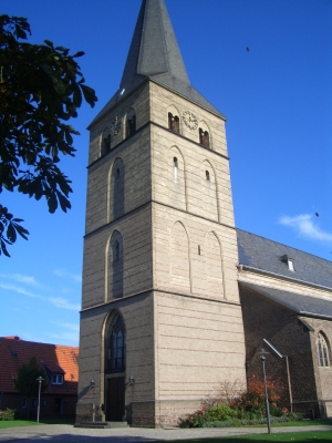 St. Peter Spellen, Süd-West Ansicht